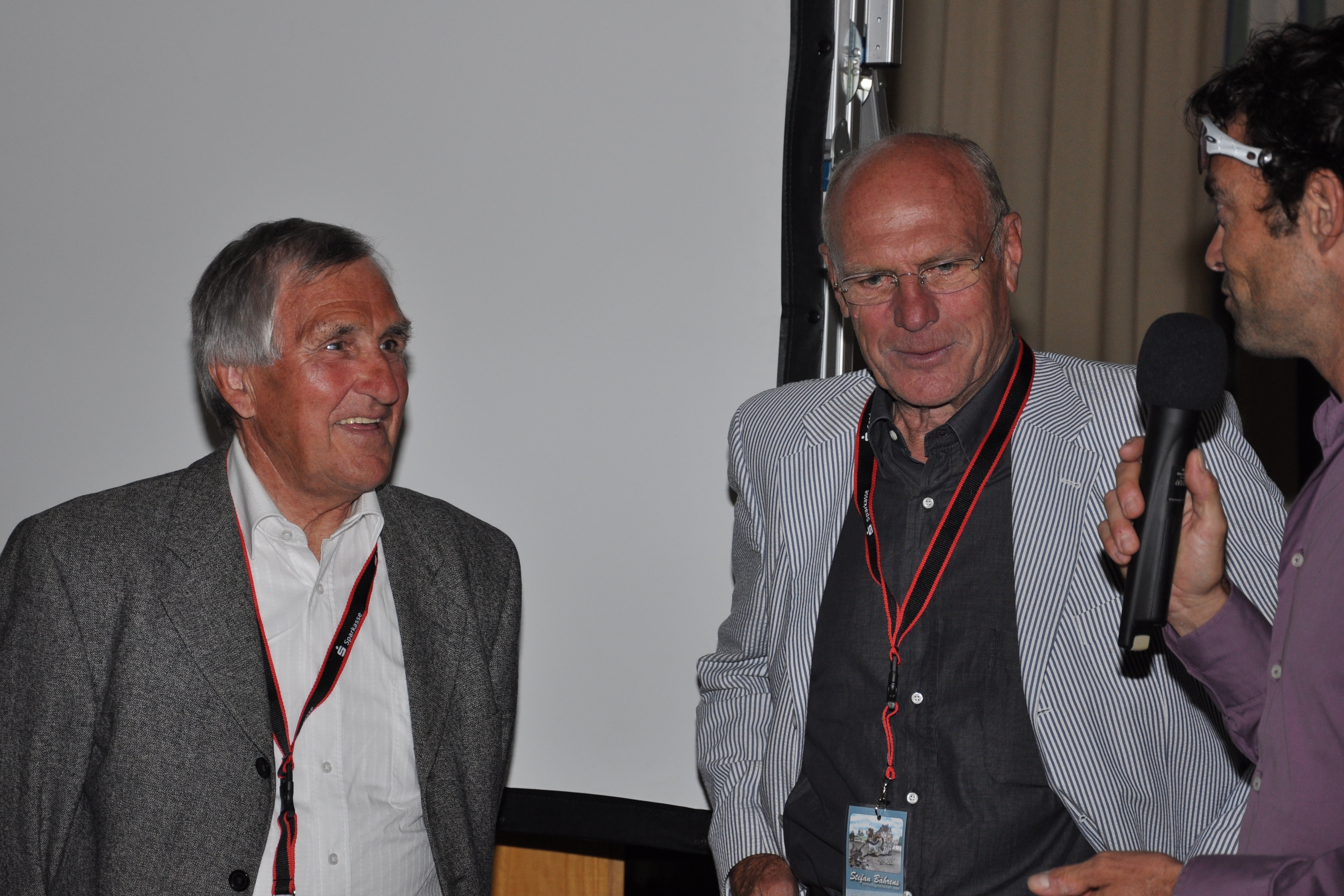 Hans (genannt Hennes) Junkermann (links) und Rudi Altig im Interview mit Marcel Wüst beim Empfang der 'Tour de Neuss' am 28.07.2010